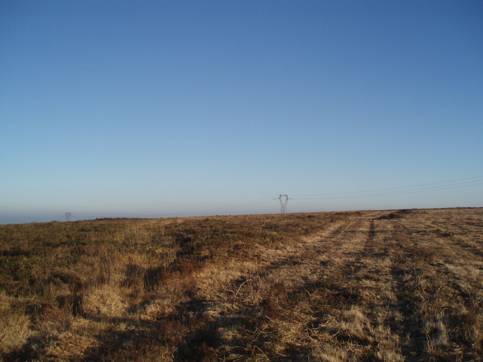 Le mont Keryeven à Loqueffret (296 m d'altitude)